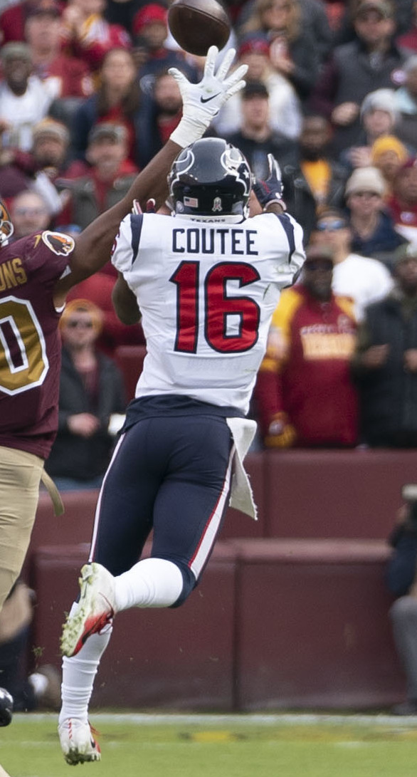 Texans at Redskins 11/18/18